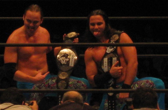 2013年11月9日 大阪府立体育会館 「POWER STRUGGLE」 ヤング・バックス